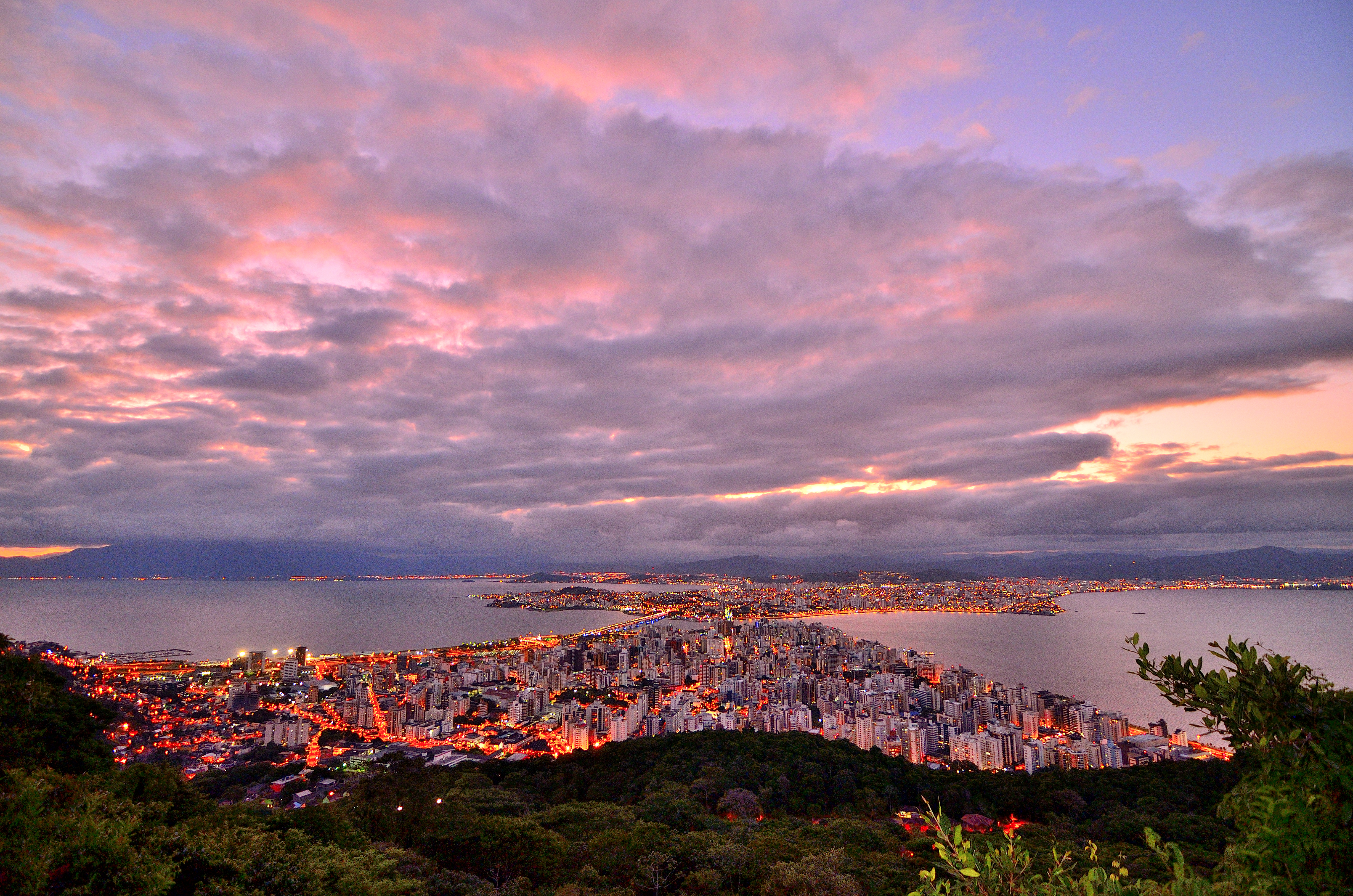 Morro da Cruz, Florianópolis - SC, Brazil